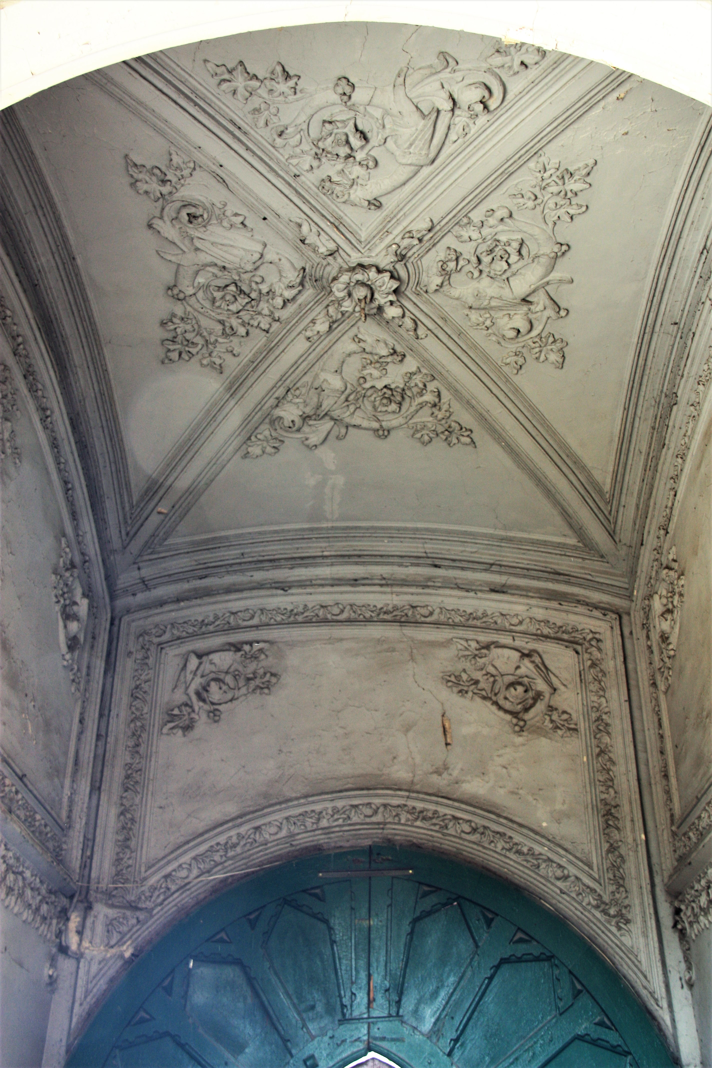 Будинок прибутковий, Київ, Ярославів Вал вул., 1. Ліпнина на вході